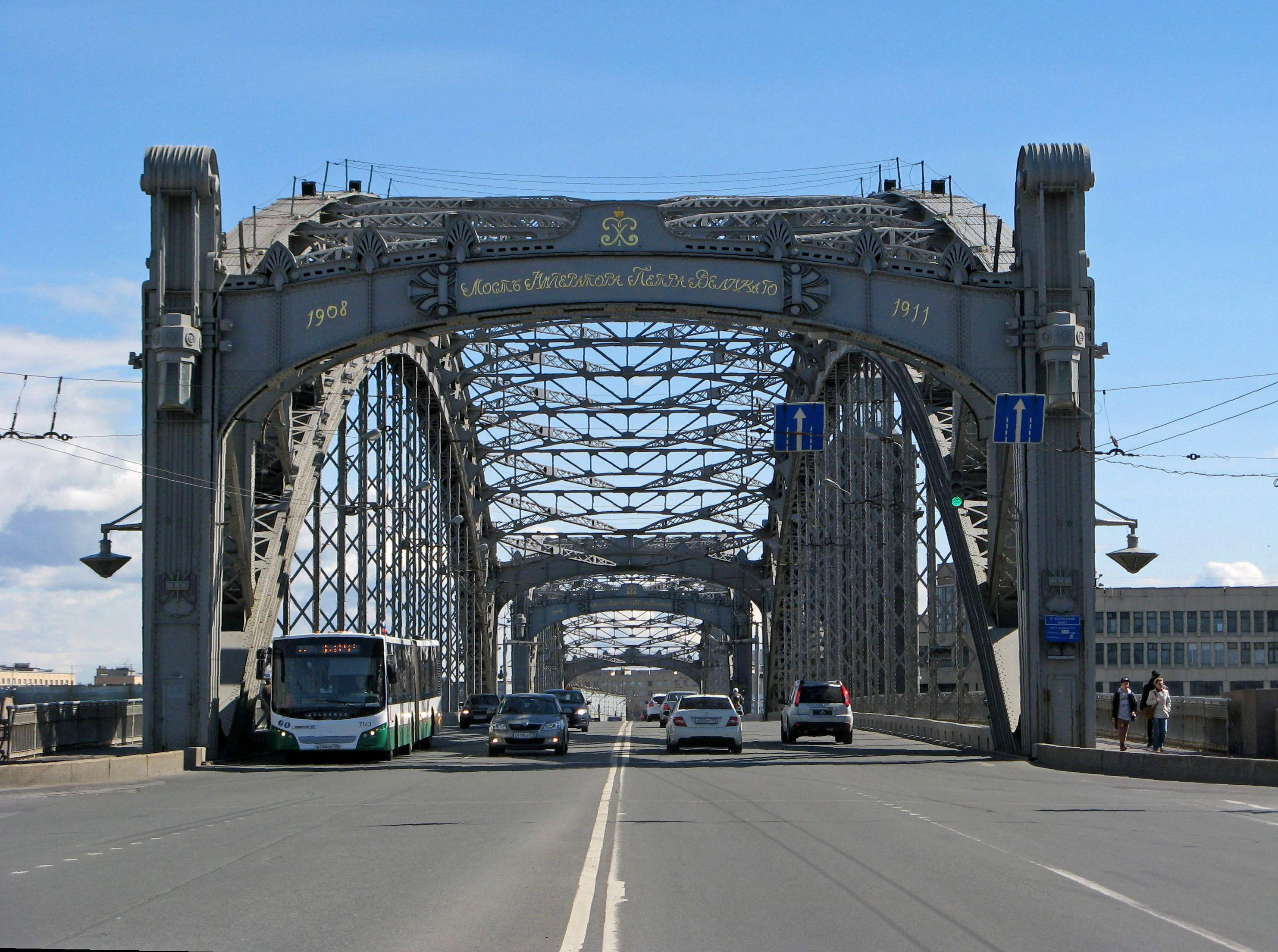 Мост Большеохтинский (мост Петра Великого): через р. Неву, по оси Тульской улицы к Красногвардейской площади, Красногвардейский район, Санкт-Петербург